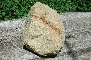 Muschelkalkstein mit erzhaltigem Einschluss (sog. Galmei). Solche Gesteinbrocken wurden in den vergangenen Jahrhunderten im Bergbau wirtschaftlich genutzt. Fundort: Gewann Eichteich bei Wiesloch (Rhein-Neckar-Kreis), Baden-Württemberg.